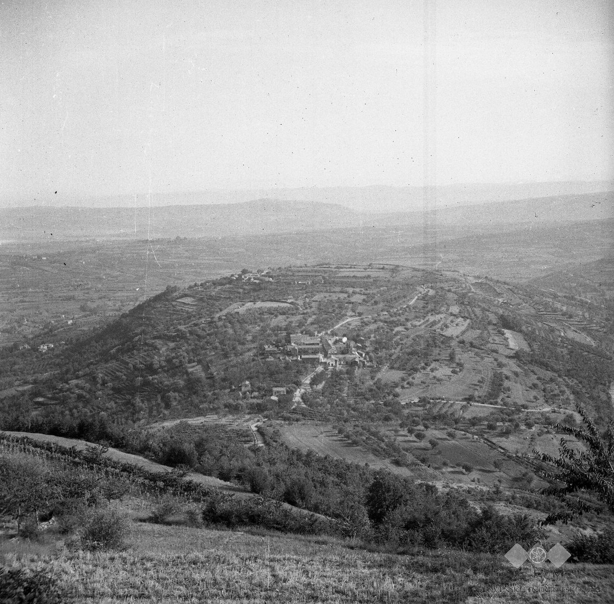 Pogled na Veliki in Mali Čentur (s poti na Pomjan).